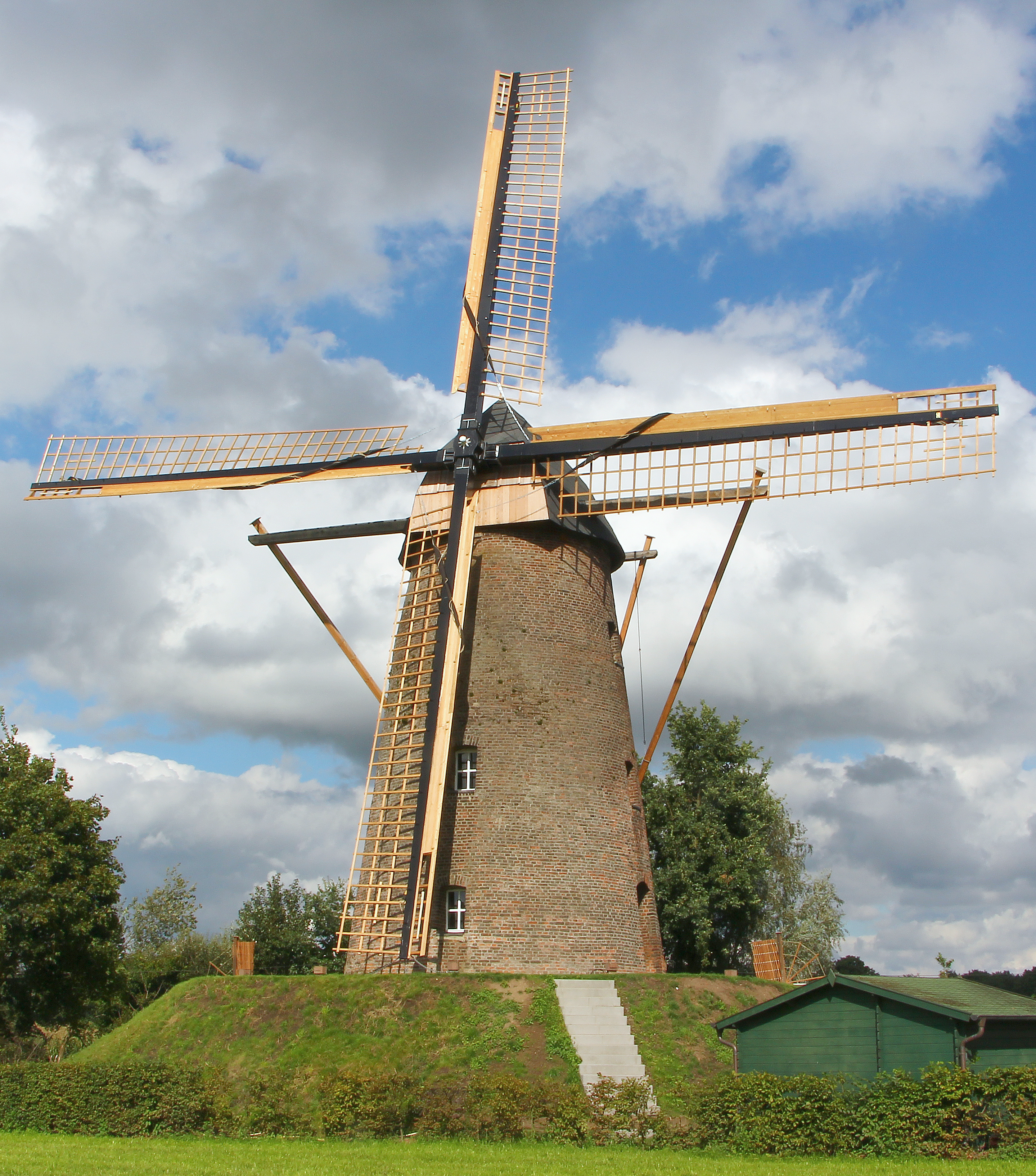 Die Windmühle Habers in Rhede Krommert ist nun komplett restauriert.This is a photograph of an architectural monument., no. 15